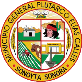 Escudo de armas del municipio de General Plutarco Elías Calles